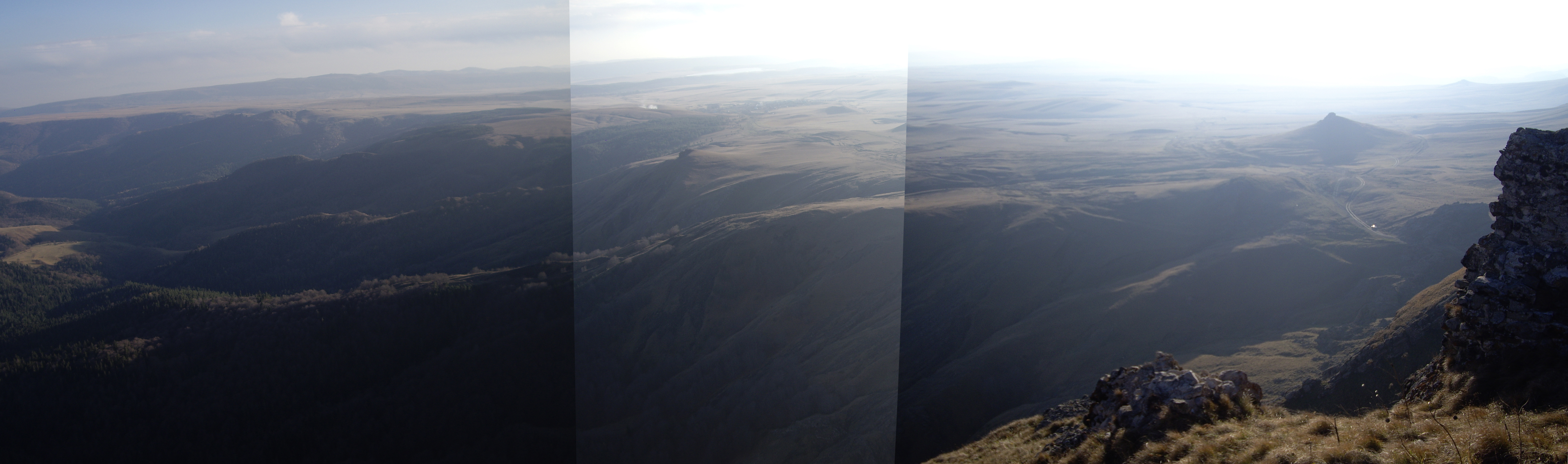 ხედი კლდეკარიდან ალგეთის ხეობაზე